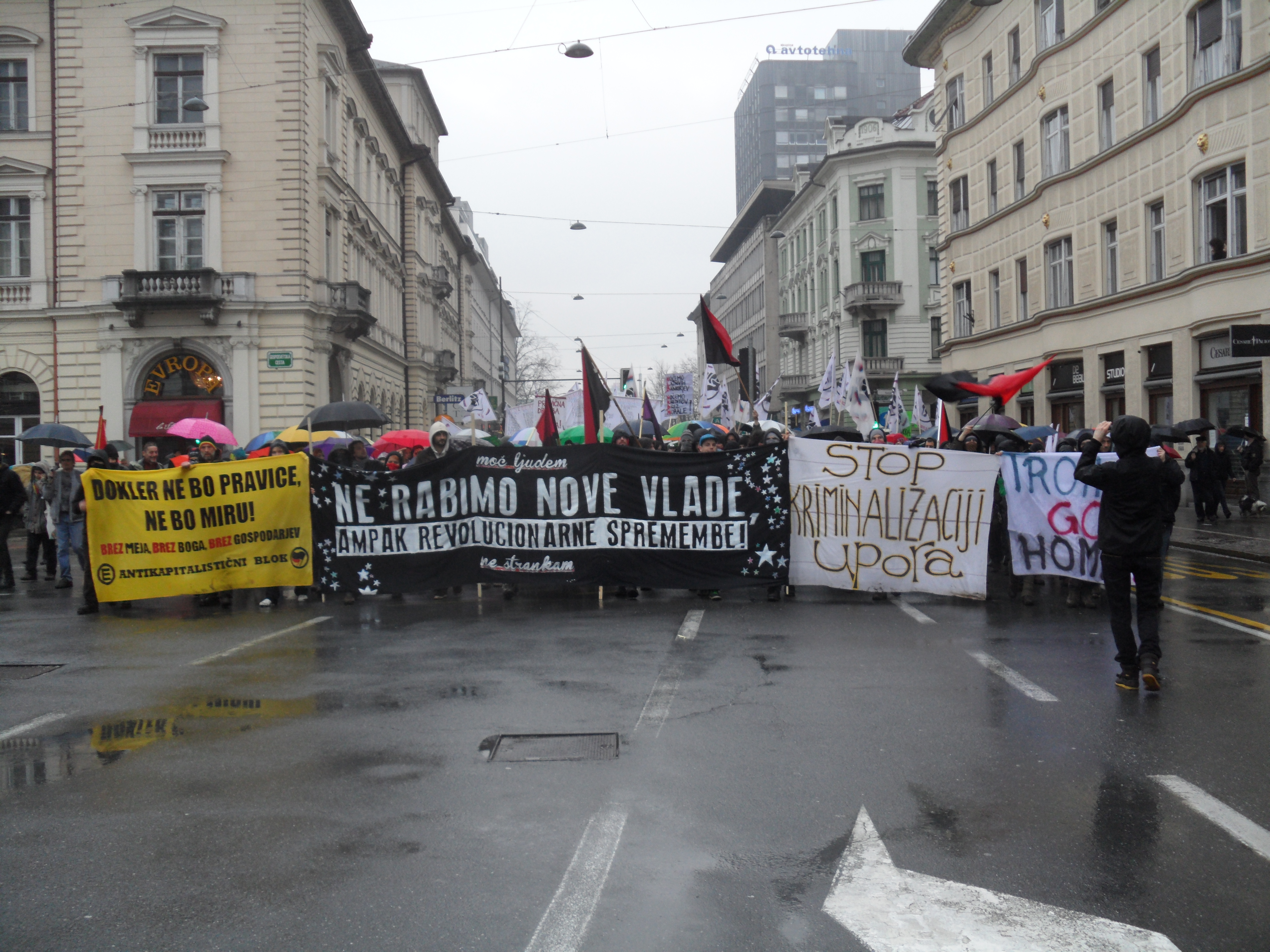 Antikapitalistični blok: "Dokler ne bo pravice, ne bo miru! Brez meja. Brez boga. Brez gospodarjev. Ne rabimo nove vlade, ampak revolucionarne spremembe. Moč ljudem, ne strankam. Strop kriminalizaciji upora. Troika go home." Na četrti vseslovenski vstaji se je zbralo okoli 5000 ljudi. Kot je poudaril odbor Vseslovenske ljudske vstaje, je osnovna zahteva protestnikov, odstop političnih elit, ostala neizpolnjena. Protestniki so zato v obliki t.i. Pomladne deklaracije vseslovenske ljudske vstaje zahtevali razpis predčasnih volitev v roku šestih mesecev od imenovanja prehodne vlade, na čelu prehodne vlade pa osebo z nesporno moralno integriteto. Prav tako so zahtevali instrument ljudske nezaupnice in radikalno reformo sodstva, pa tudi takojšnje in učinkovito sojenje vsem, ki so do premoženja prišli na sporen način, in tudi, da bankirji prevzamejo odgovornost. Zahtevali so tudi prenovo Slovenije, ki bo temeljila na morali in socialni pravičnosti, večji vpliv ljudi na to, kdo bo sedel v DZ skozi preferenčni glas ter ustanovitev ustavne komisije, ki bo vključevala državljane in uveljavila potrebne spremembe v ustavi.